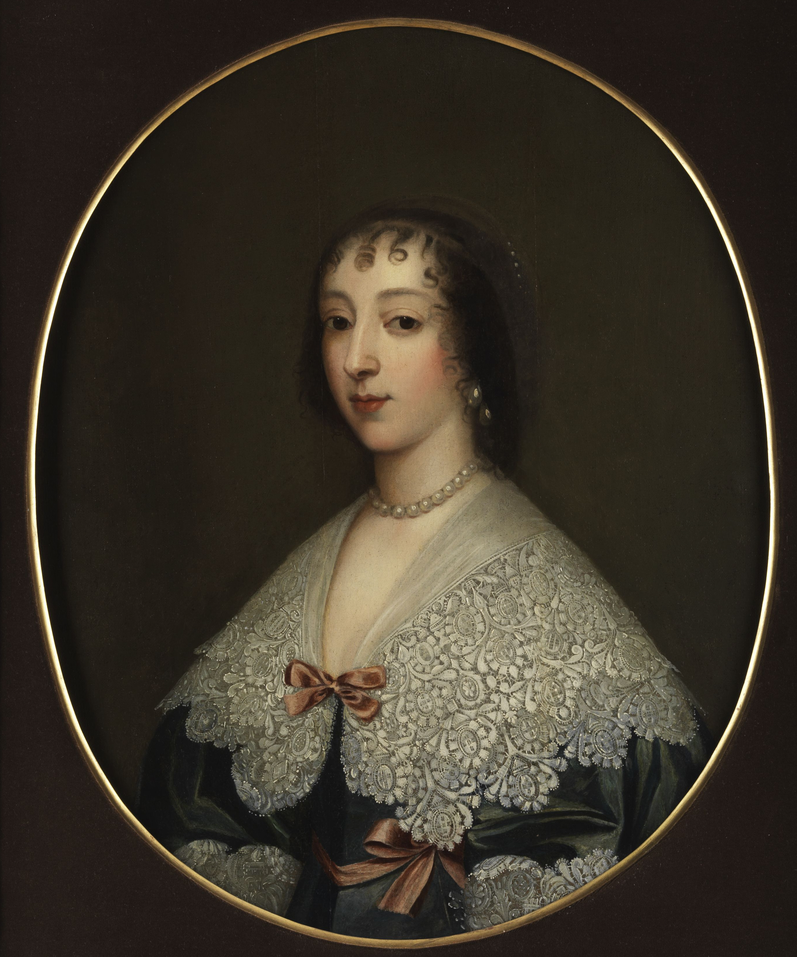 laut Auktionshaus Hampel (falls zutreffend, muss wohl Henrietta Maria von Frankreich gemeint sein)